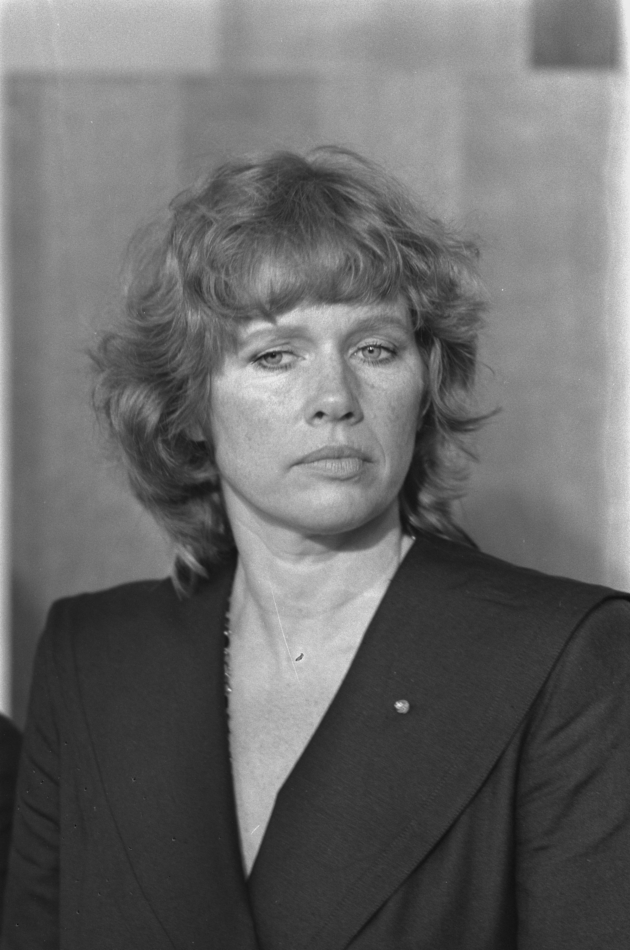 Collectie / Archief : Fotocollectie Anefo Reportage / Serie : [ onbekend ] Beschrijving : Prinses Juliana bij uitreiking Four Freedoms Awards in Middelburg; actrice Liv Ullman , koppen Datum : 23 juni 1984 Locatie : Middelburg, Zeeland Trefwoorden : actrices, filmsterren, portretten, prijsuitreikingen Persoonsnaam : Ullman, Liv Fotograaf : Croes, Rob C. / Anefo Auteursrechthebbende : Nationaal Archief Materiaalsoort : Negatief (zwart/wit) Nummer archiefinventaris : bekijk toegang 2.24.01.05 Bestanddeelnummer : 933-0123